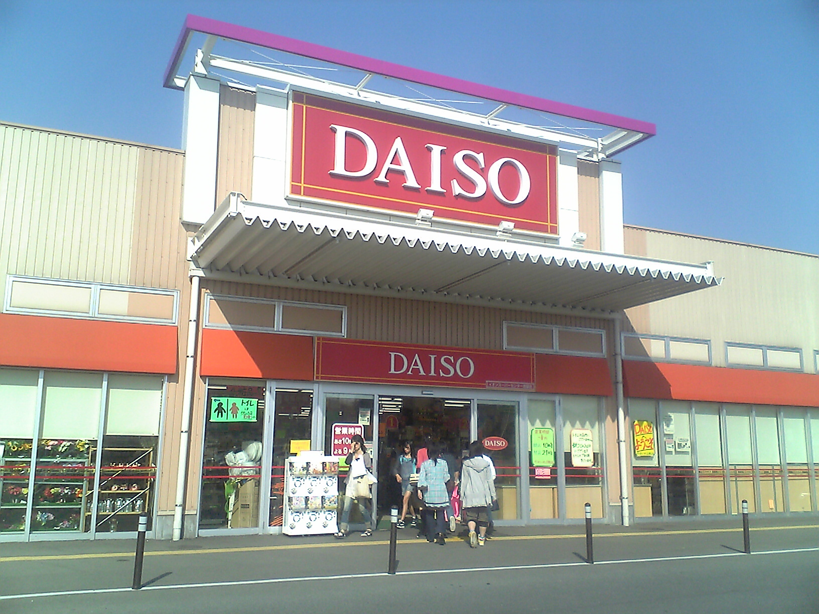 福岡県志摩町にあるダイソーイオン志摩ＳＣ店